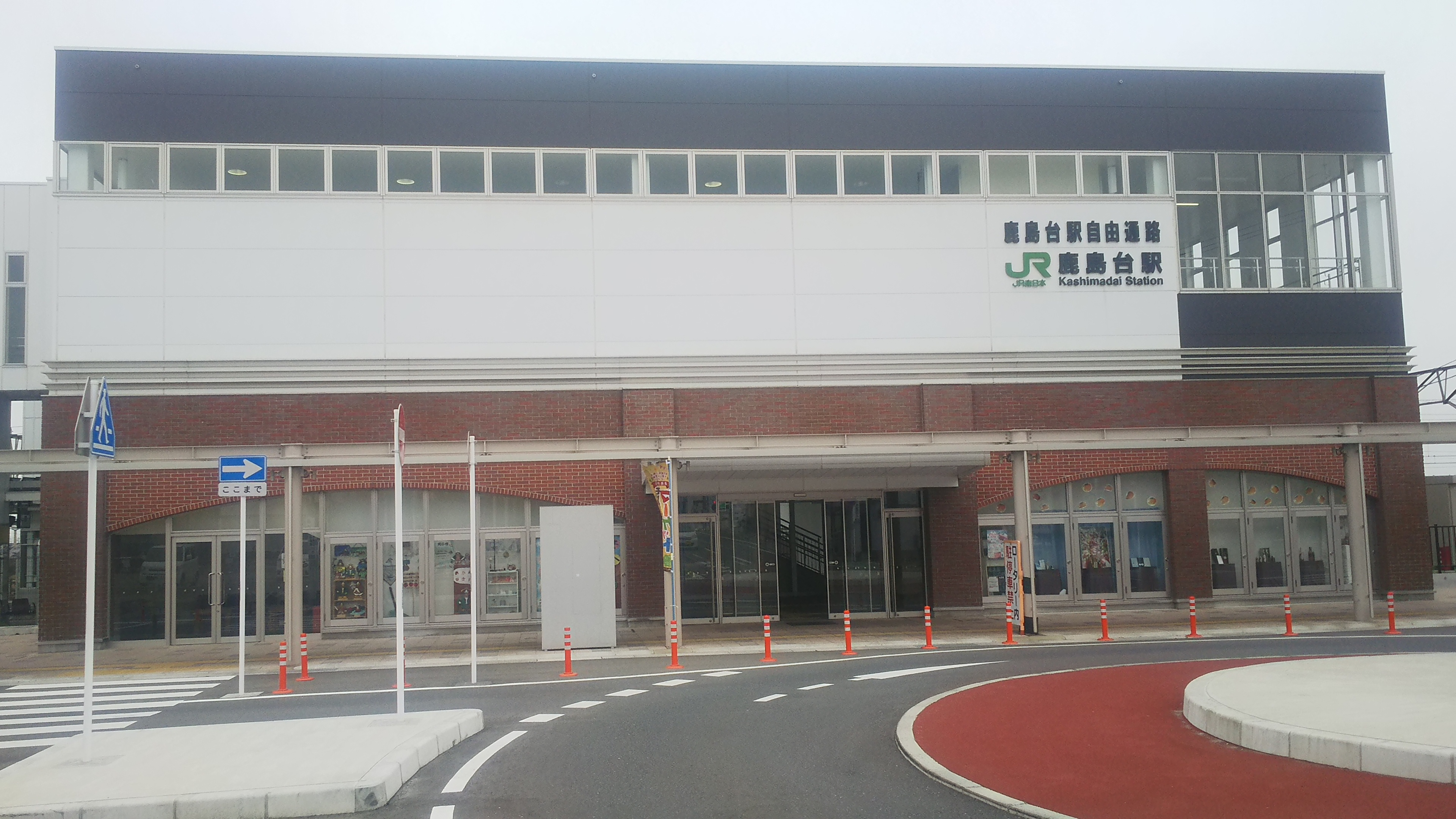 鹿島台駅駅舎西口